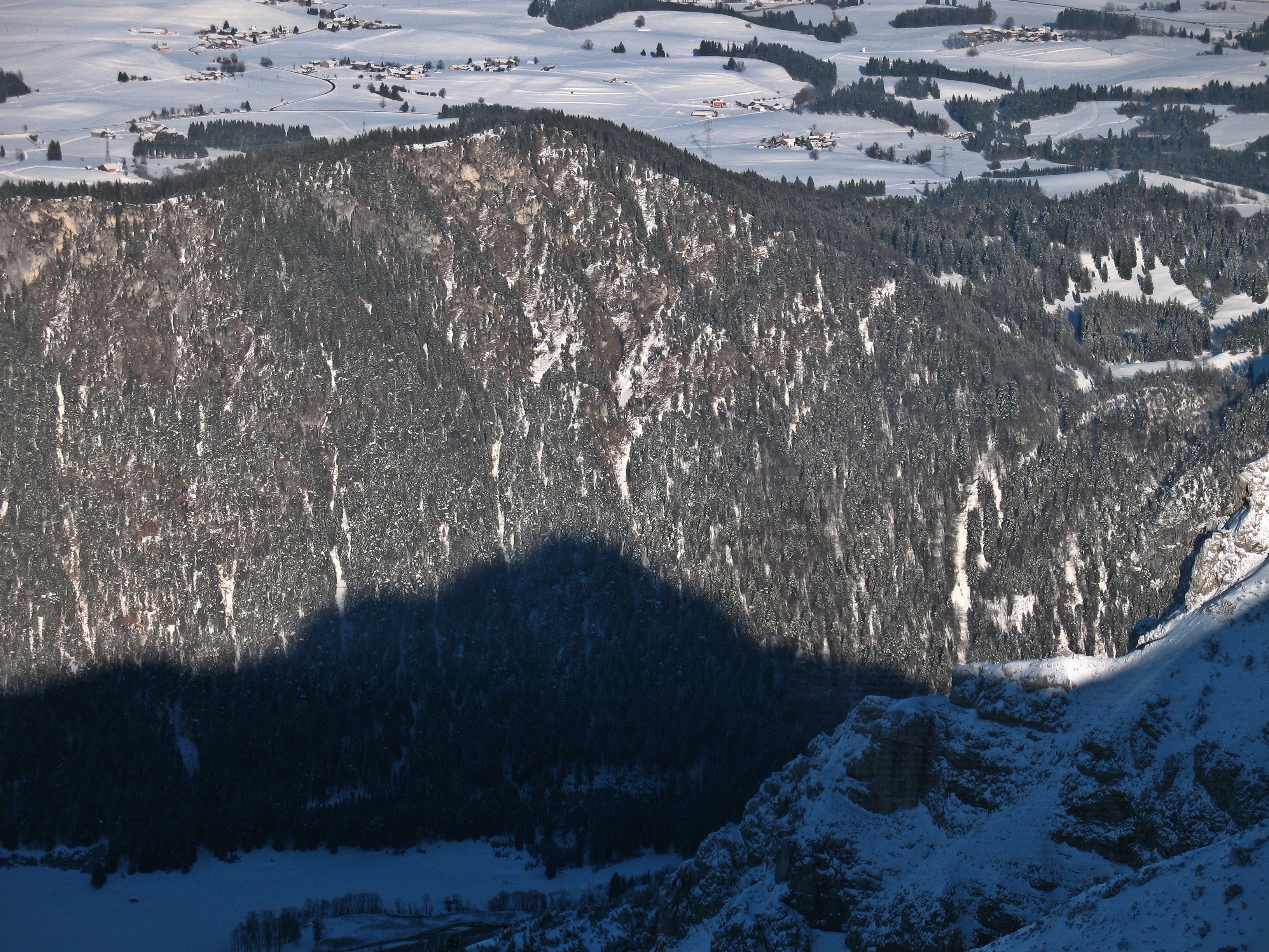 Blick vom Brentenjoch (2000 m) nach Norden über das Tal der Vils auf den Zirmgrat (1293 m).